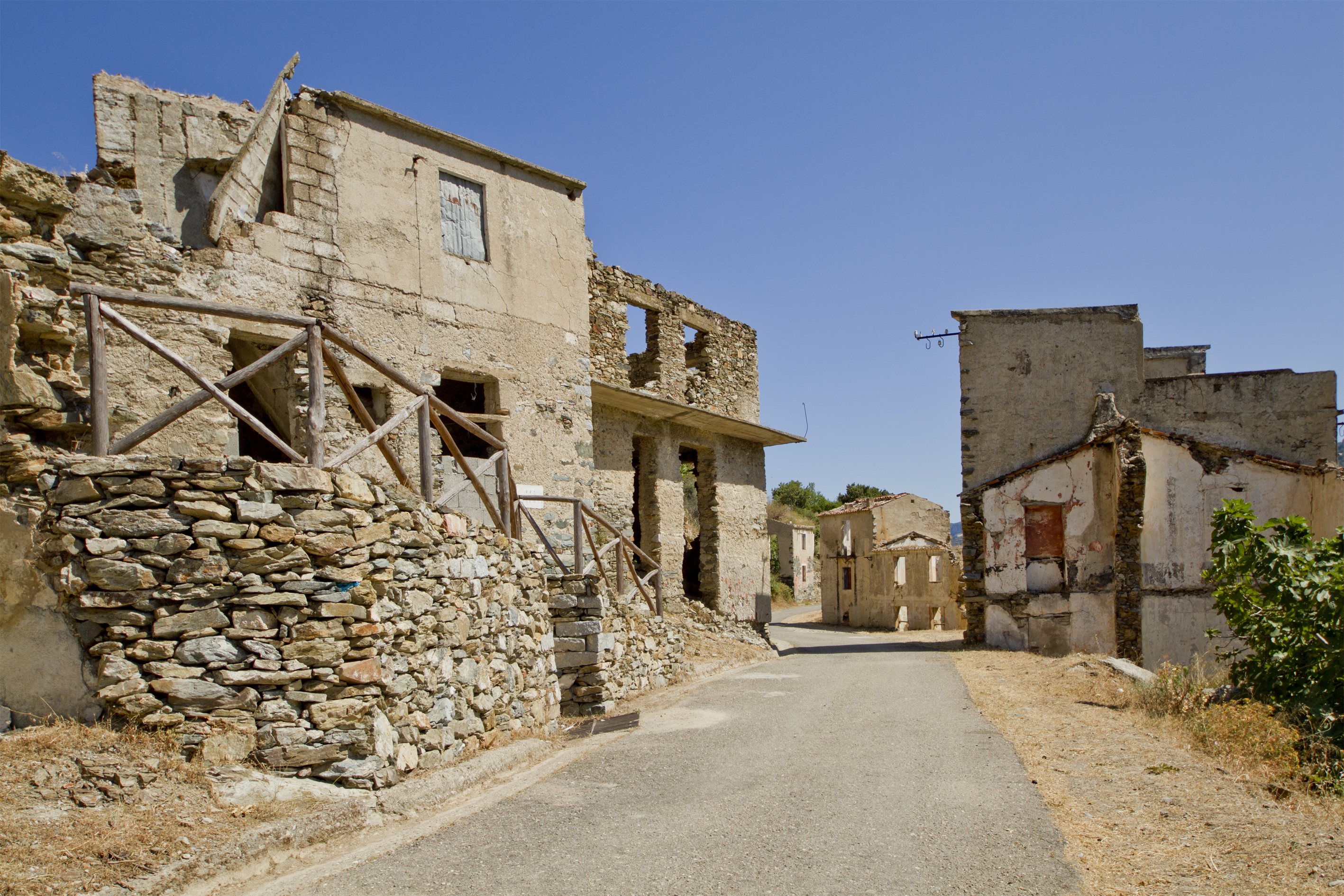 Gairo vecchio, Ogliastra, Sardinia, Italy